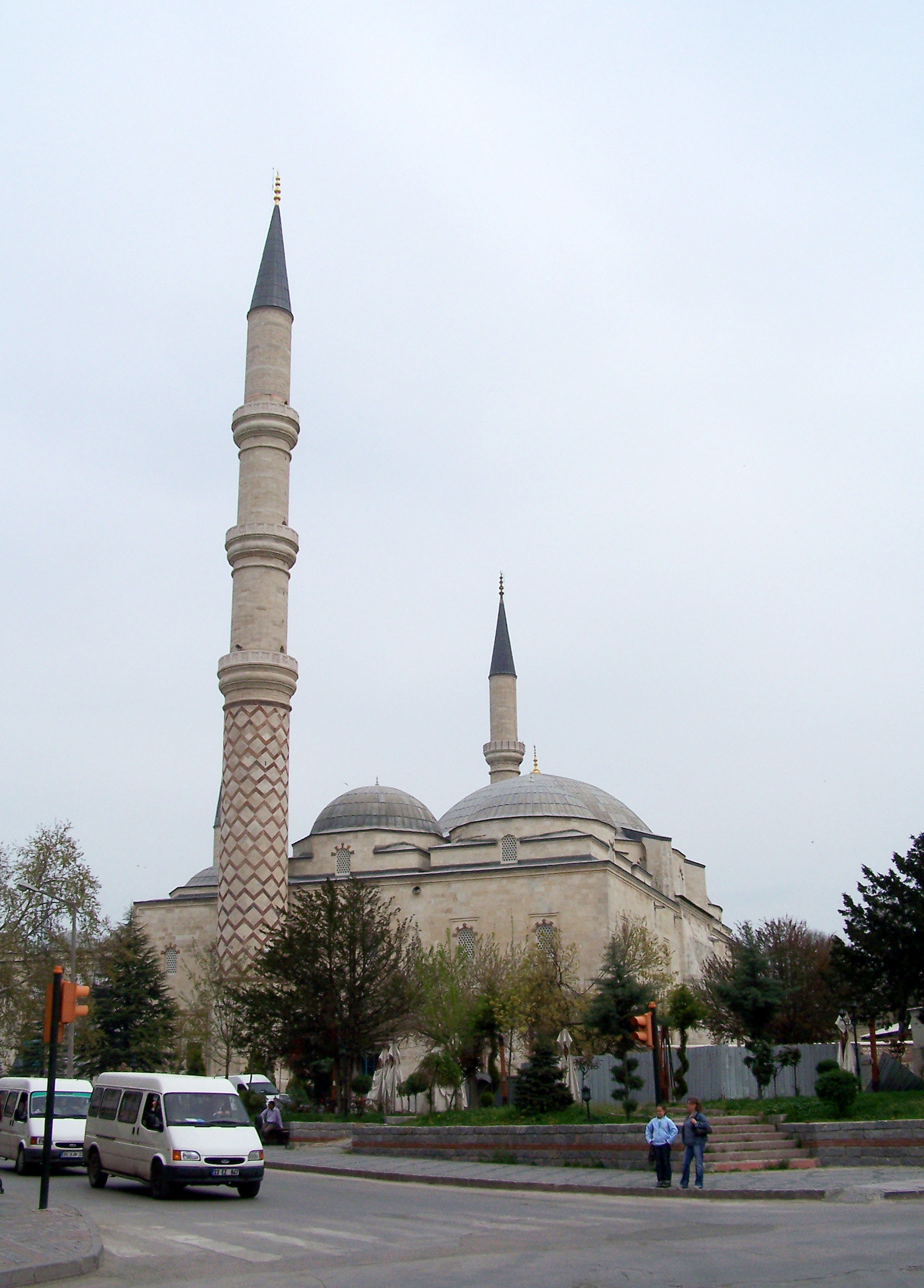 Üç Şerefeli Camii in Edirne, Turkey